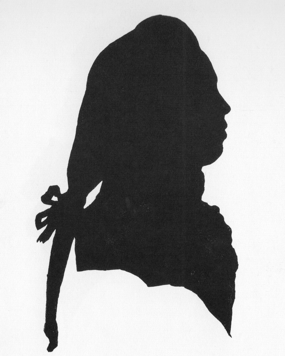 Bernhard Albrecht Moll (1743–1788): Der spätere Direktor der k. k. Hofgärten Franz Bredemeyer (1758–1839). Royal Ontario Museum, Toronto.